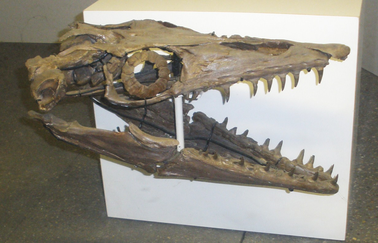 Fossil of Platecarpus, an extinct mosasaur- Took the photo at Senckenberg Museum of Frankfurt